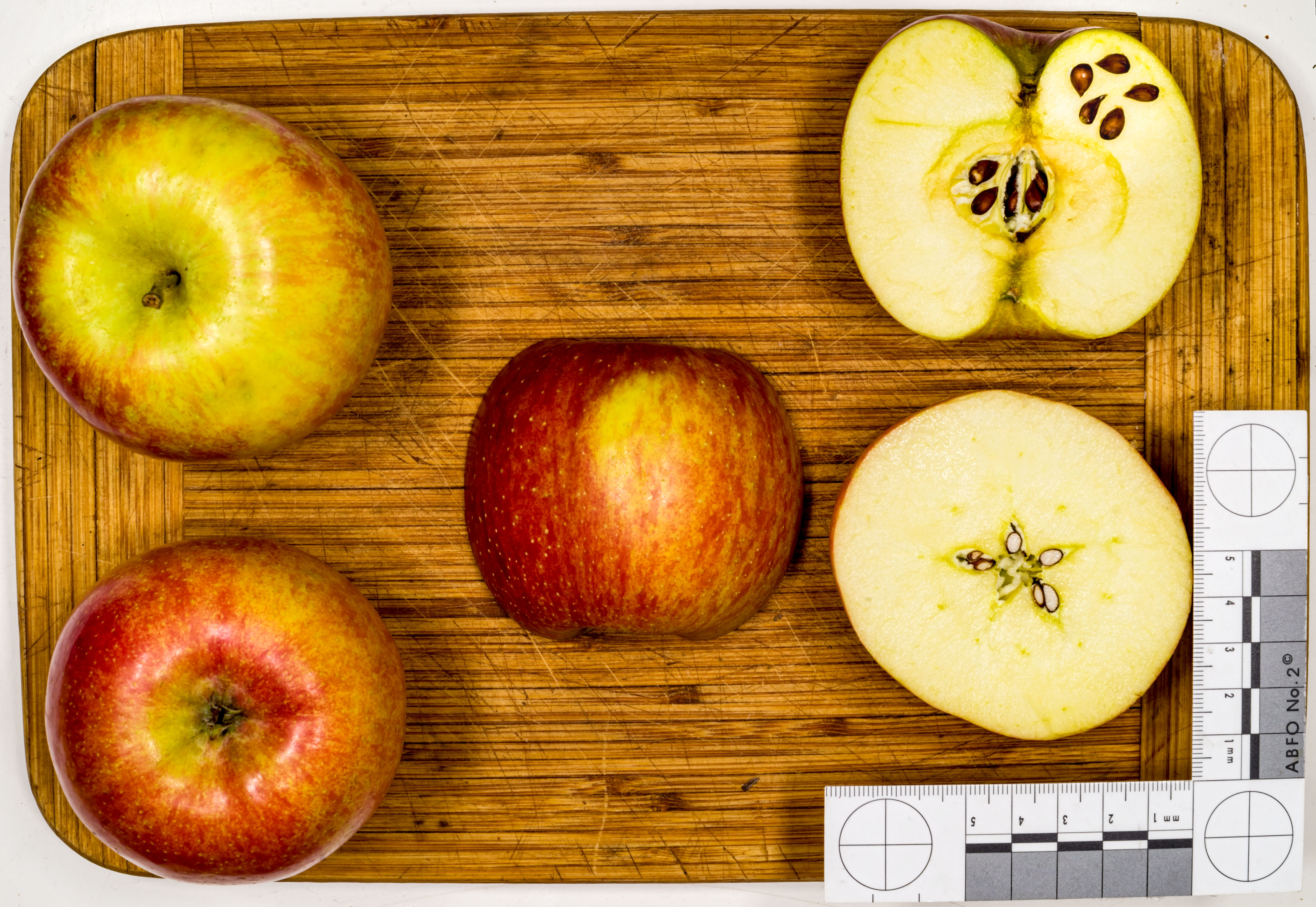 Apfelsorte: Fuji